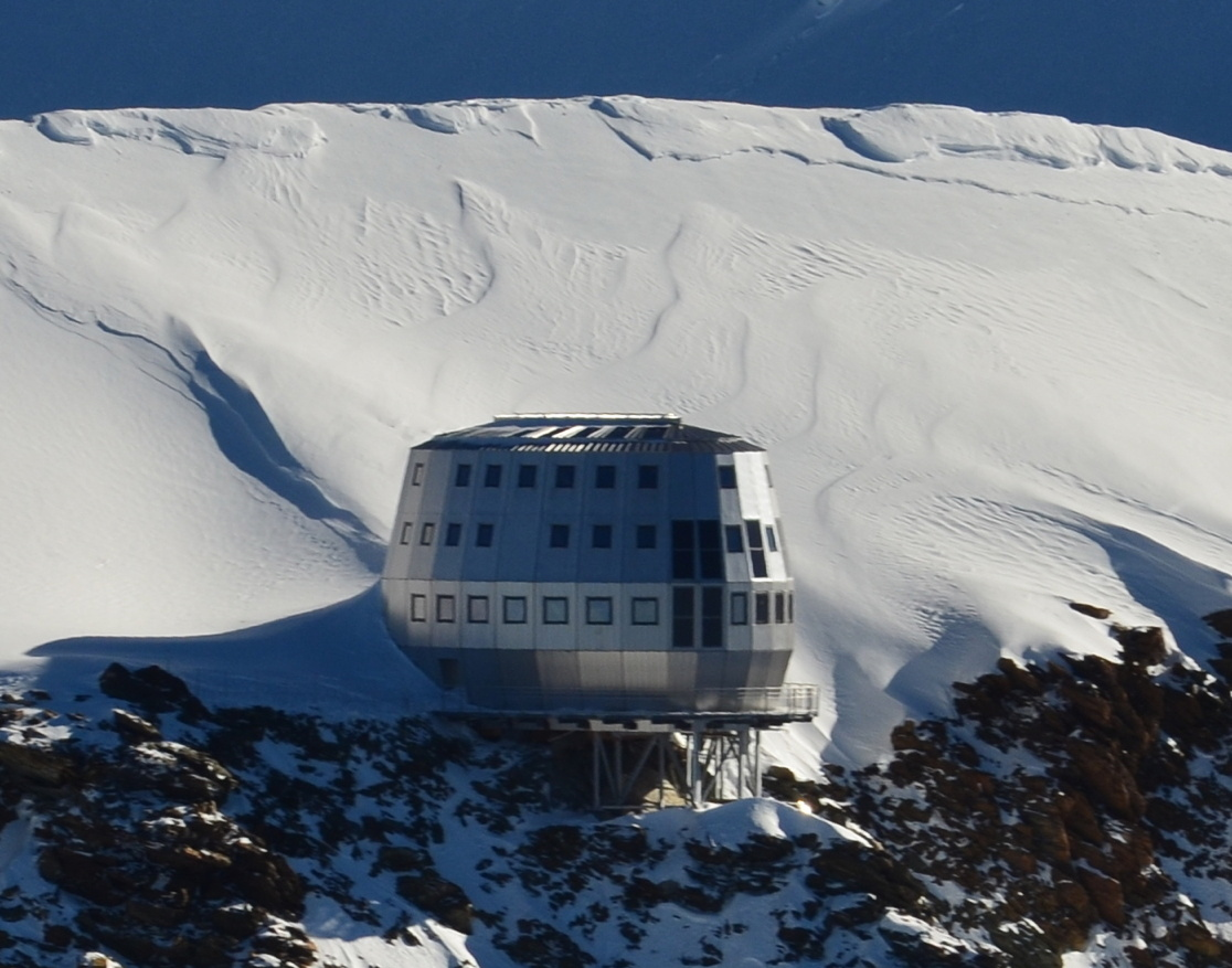 Le refuge du Goûter vu d'avion